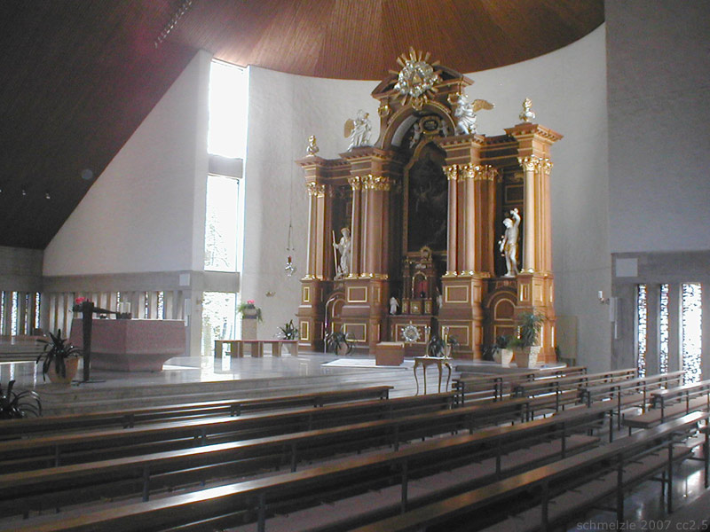 Altarraum der Kath. Kirche St. Afra in Neckargerach, Baden-Württemberg, Deutschland, ehem. Hochaltar der Kapuzinerkirche Mannheim